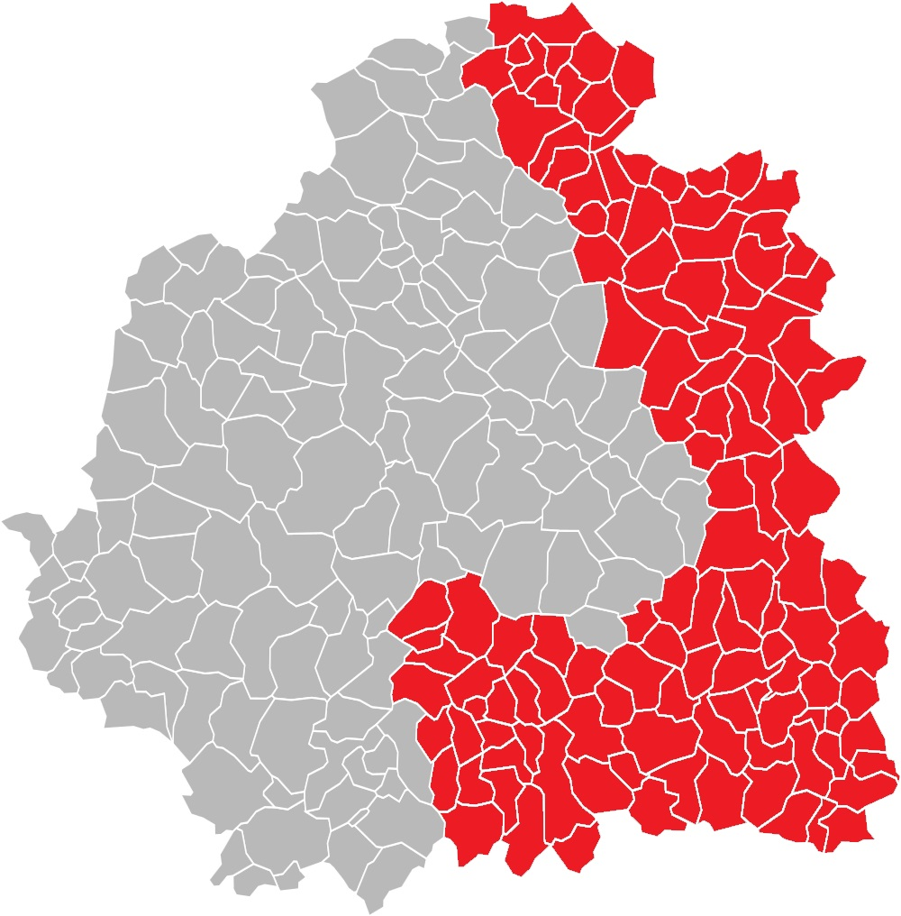 Carte des communes de l'Indre (36) : La deuxième circonscription de 1988 à 2012.